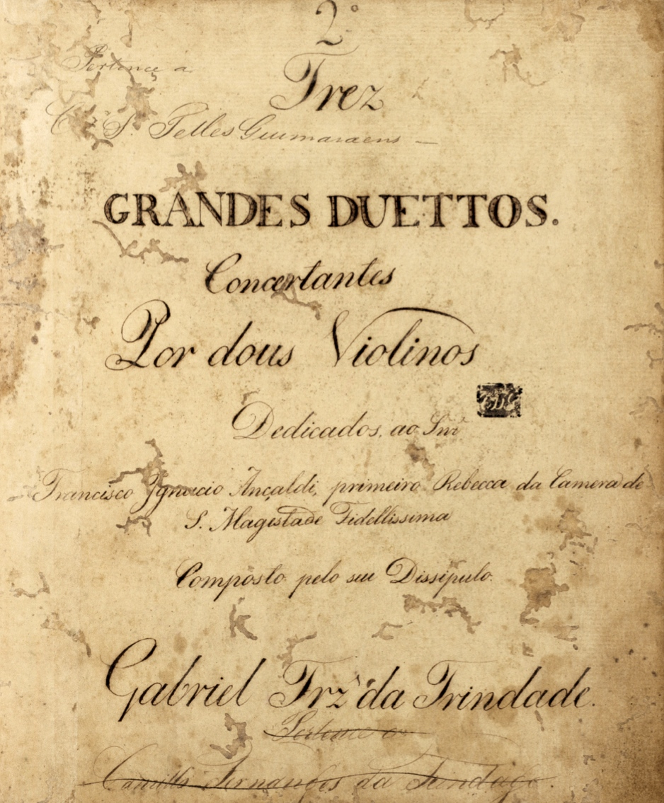 Gabriel Fernandes da Trindade - Duetos Concertantes para dois violinos (Rio de Janeiro, c.1814) - Página de rosto do violino II